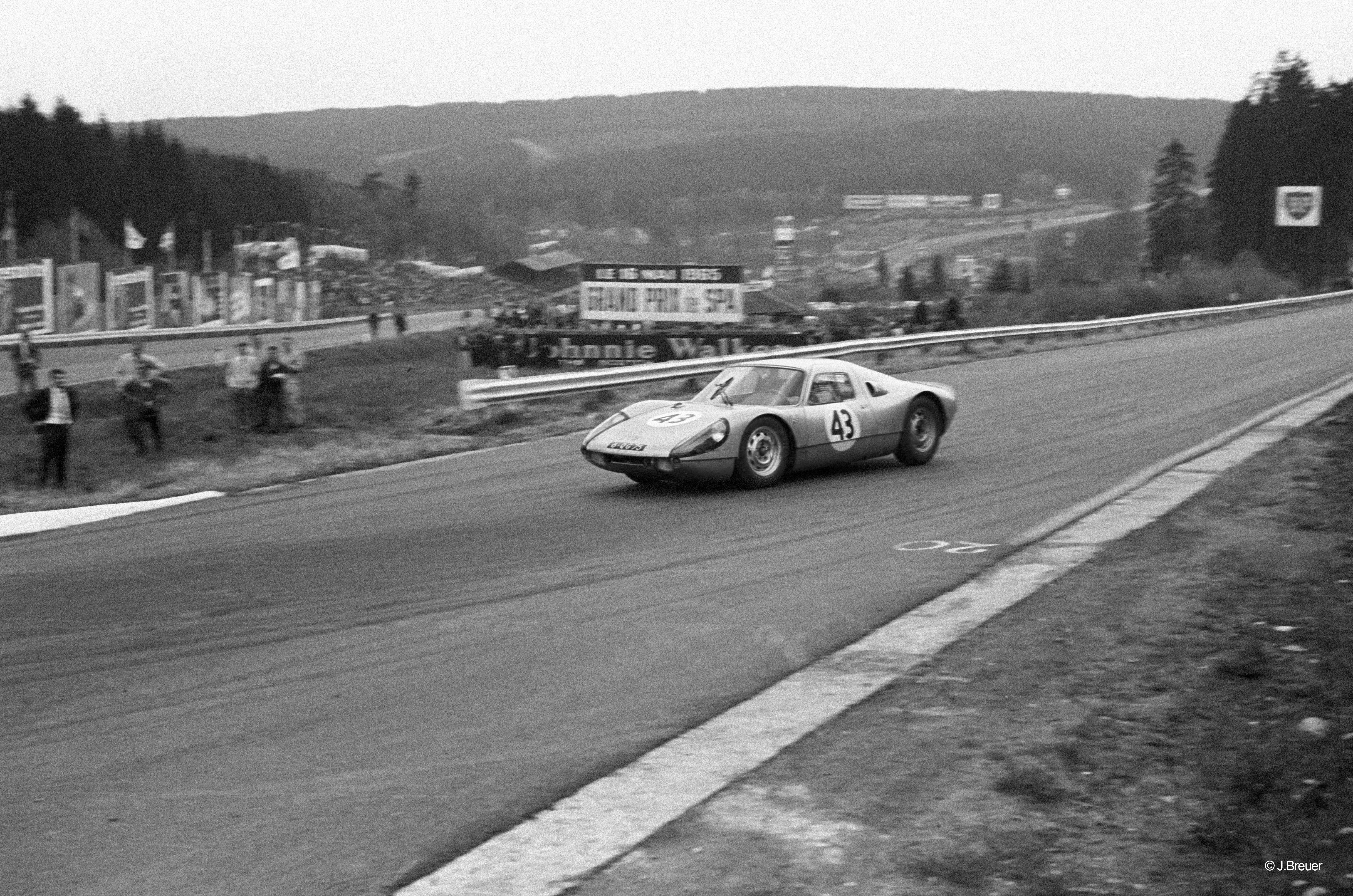 500 km de Spa 1965 - 43 Roy Von Vost